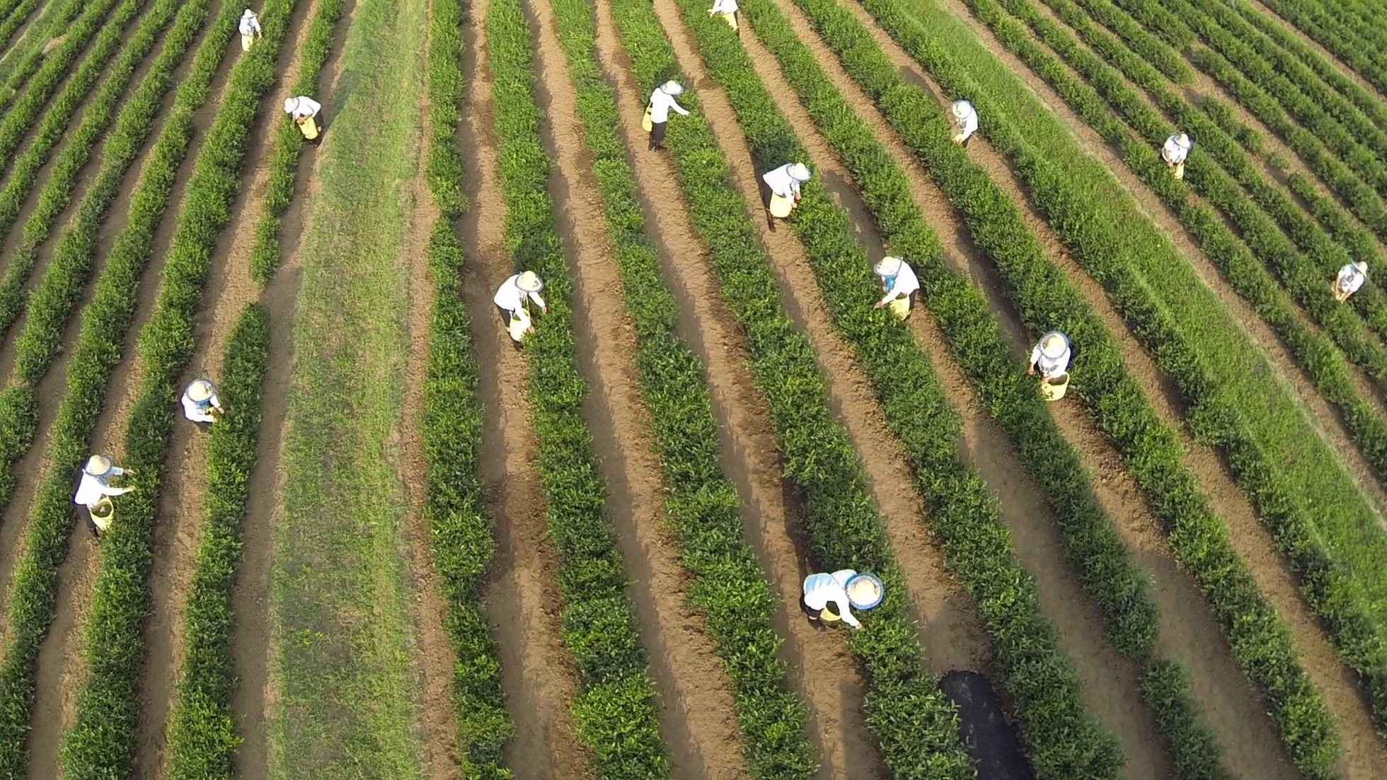 İlham Əliyev Lənkəranda “Yaşıl Çay” plantasiyası ilə tanış olarkən